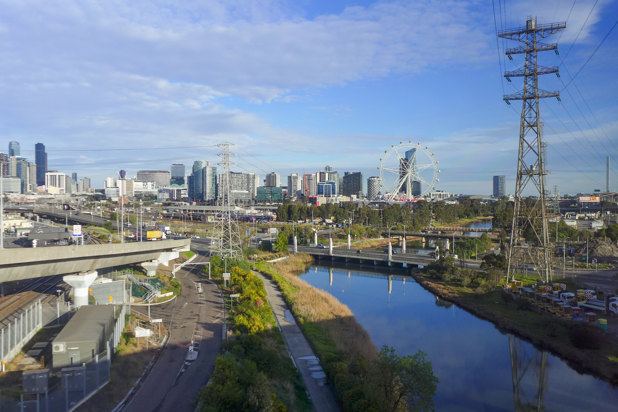 Moonee Ponds Creek Reserve